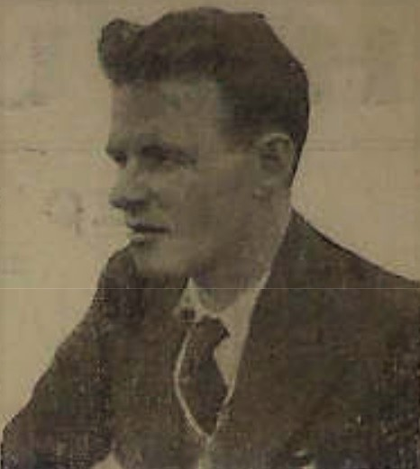 photo de Célestin Lainé publié en première page de Breiz Atao le 12 juin 1938